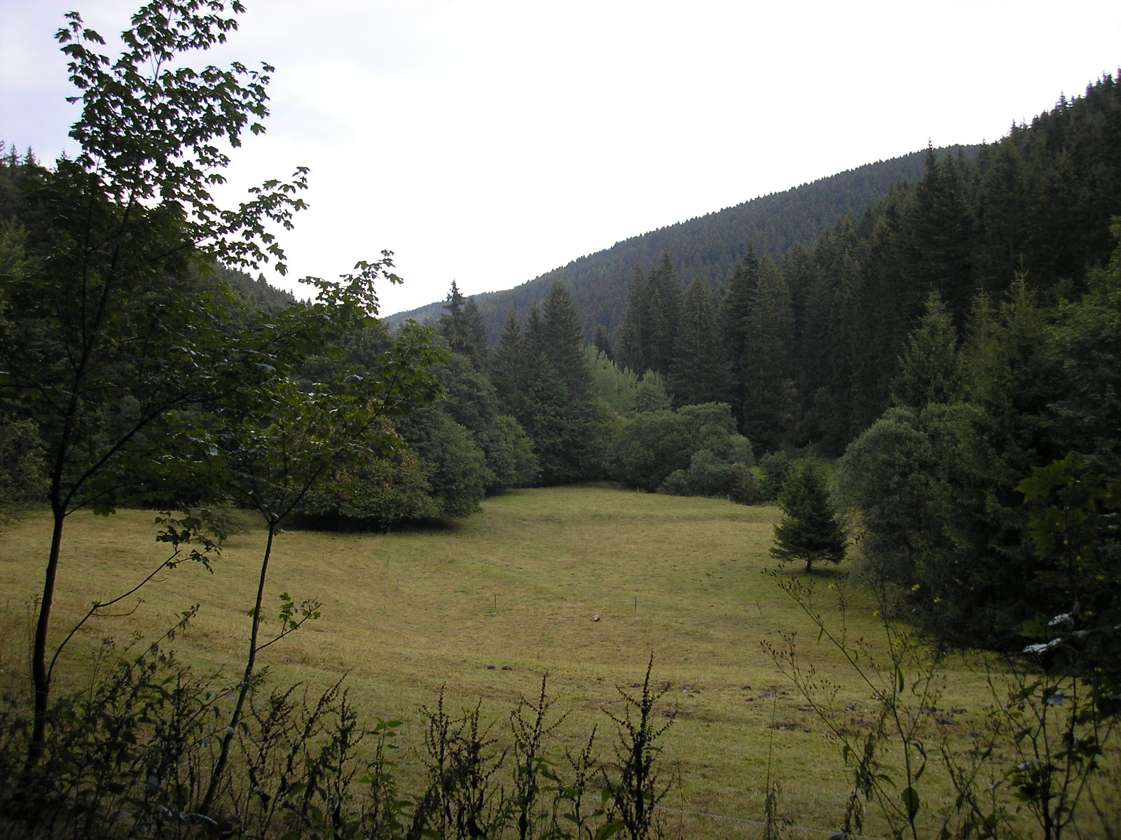 Blick durch das Tal der Schorte am "Vogelherd" unterhalb der Erbsköpfe bei Ilmenau im Thüringer Wald.